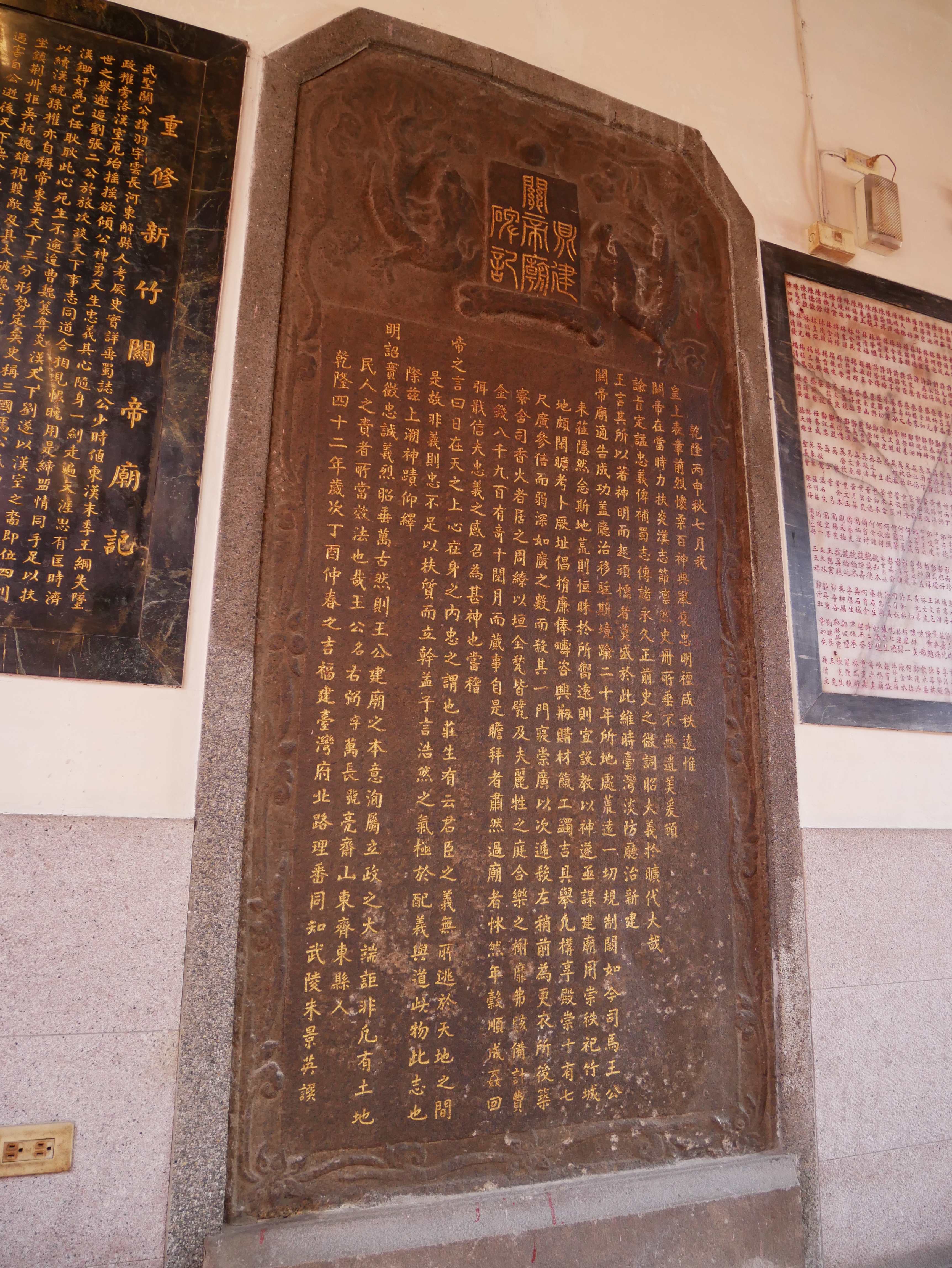 鼎建關帝廟碑記（乾隆四十二年歲次丁酉仲春之吉福建臺灣府北路理番同知武陵朱景英撰），新竹市東區南門聯里關帝里